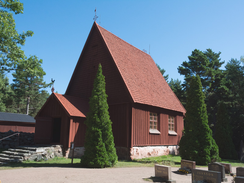 Sottunga kyrka exteriör